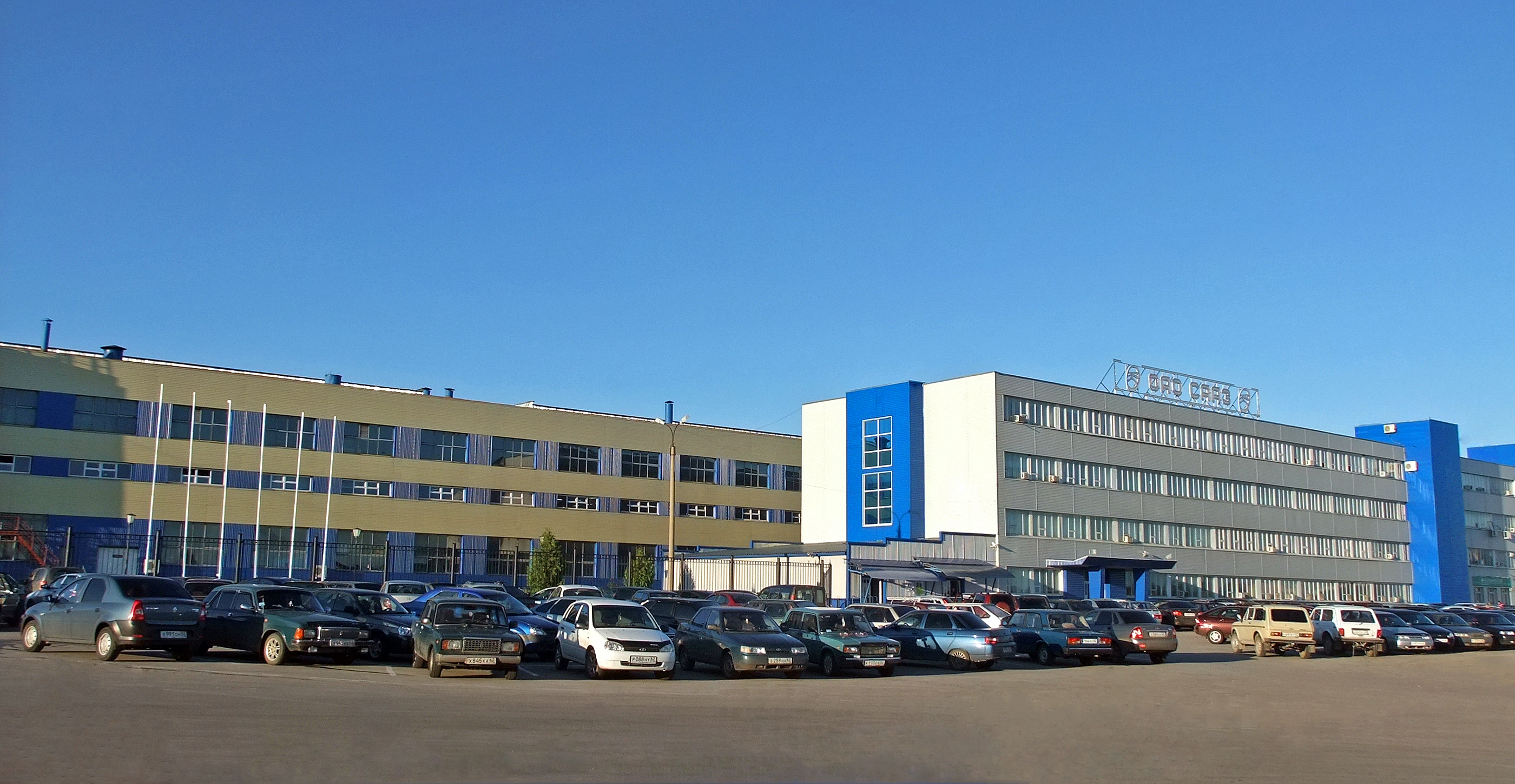 Общий вид